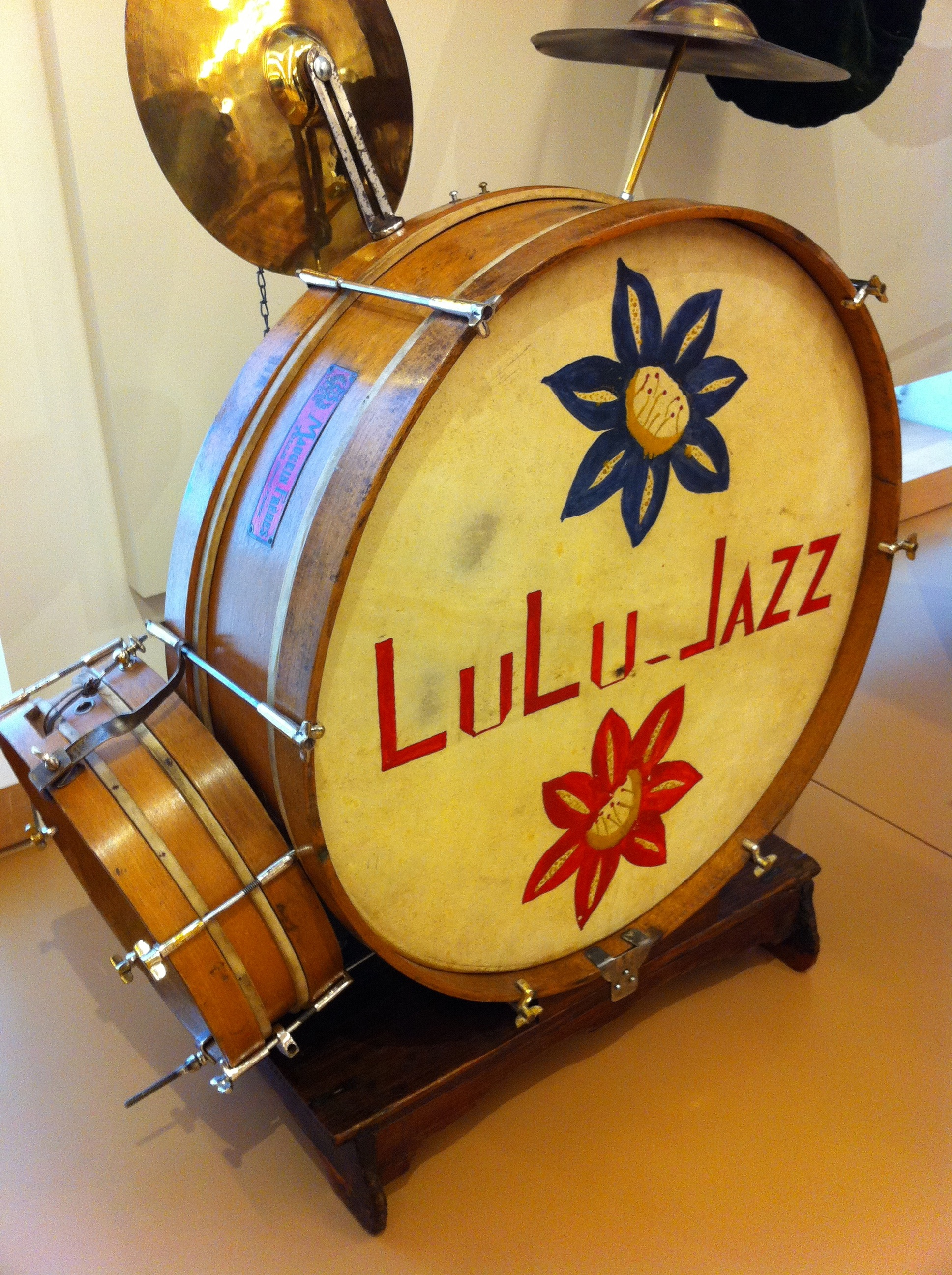 Lulu Jazz Drum